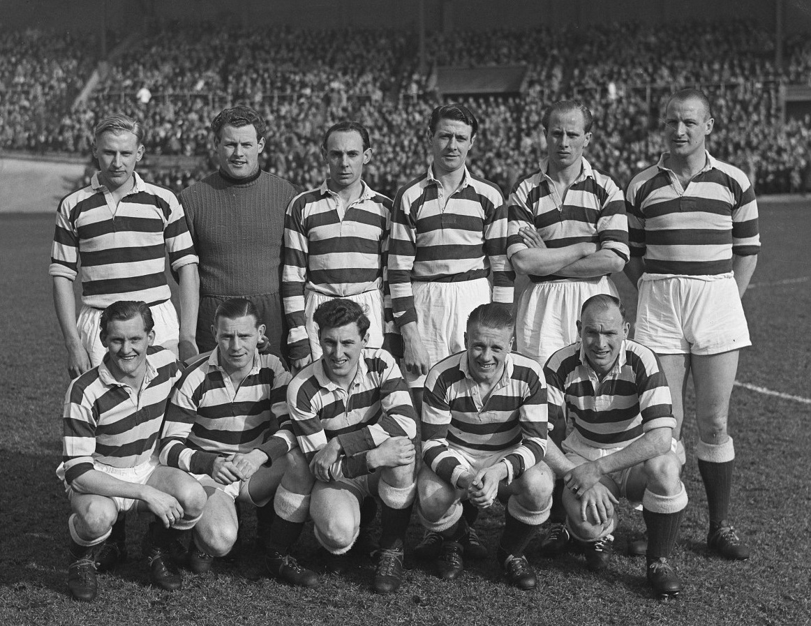 Blauw-Wit tegen Zeeburgia. Blauw-Wit elftal.Staand vlnr: J. A. Boonkamp, Herman van Raalte, Wim Kersbergen, Piet Altink, Ferry Mesman, Cor Wilders; zittend vlnr: Roel van Dijk, Piet Koekebakker, Kees Heffels, Wim Lakenberg, Ko Bergman.